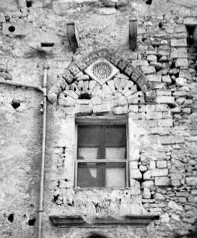 Alcamo, Castello dei Conti di Modica: La bifora centrale del muro a nord nel 1967.